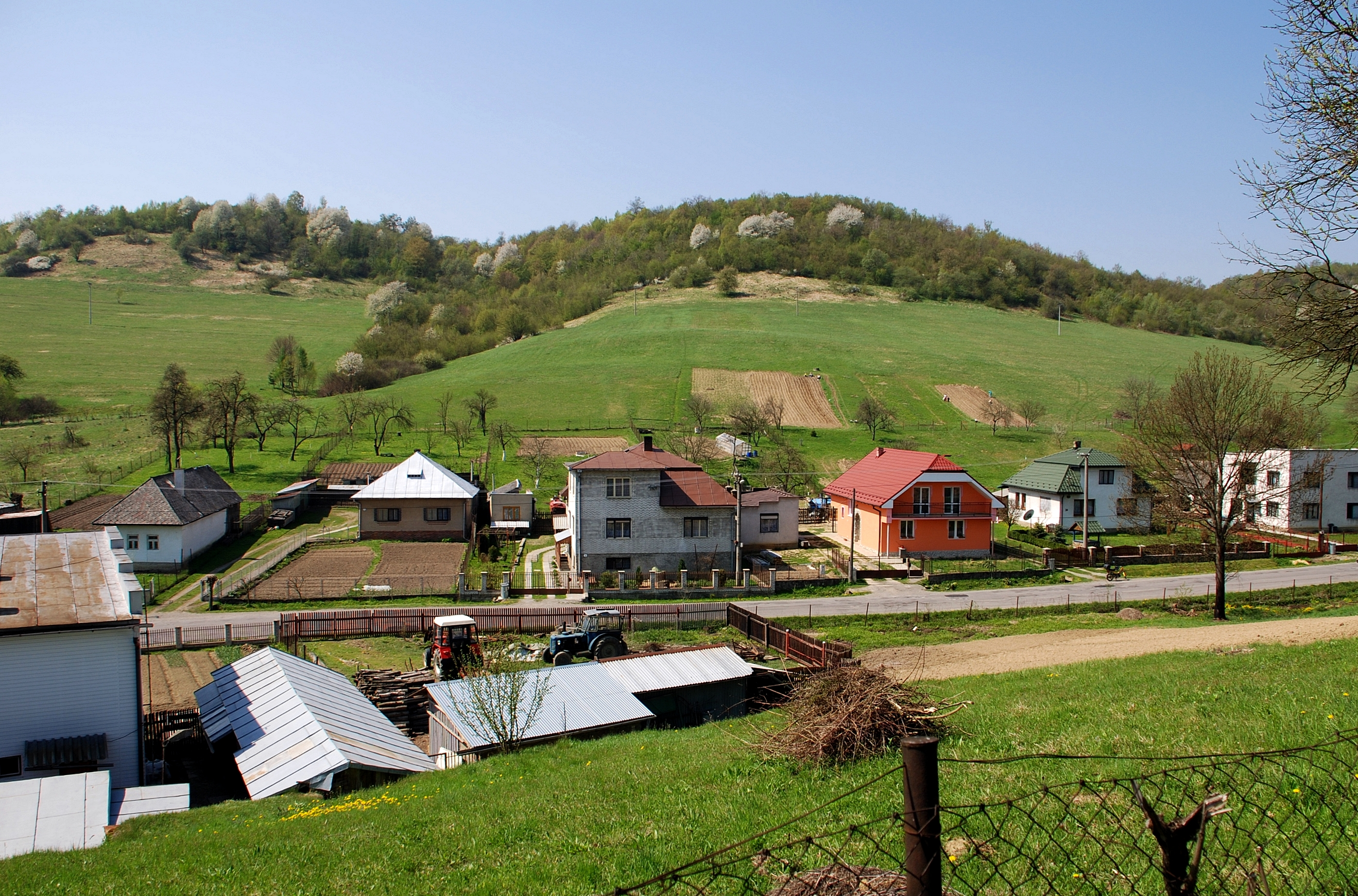 miejscowość